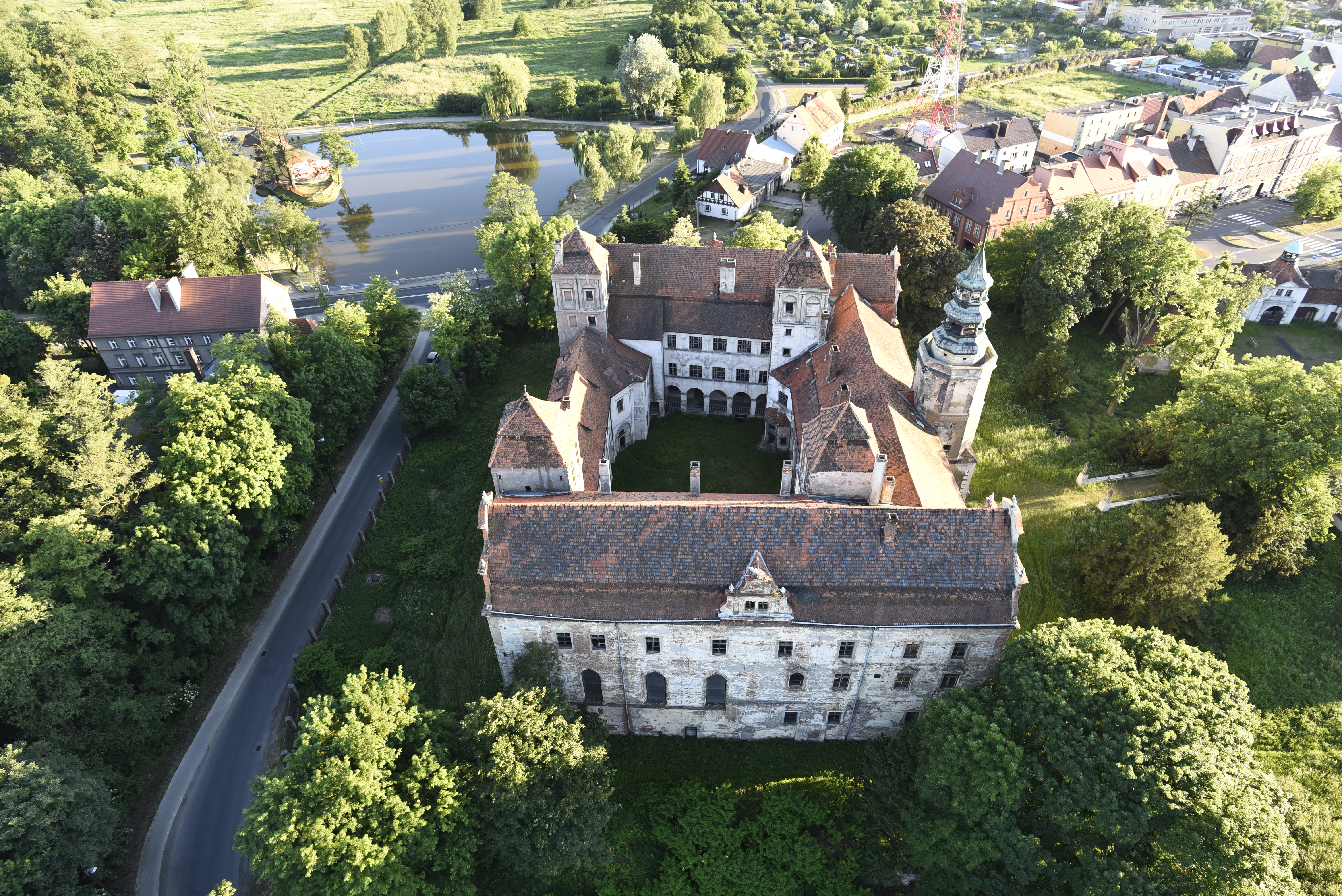 Wyjątkowy zabytek z woj. opolskiego. Zamek z XIII w. w Niemodlinie.